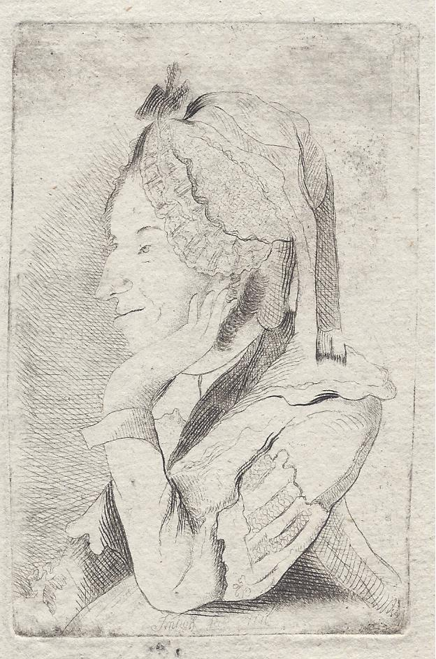 Alt bezeichnet als Porträt der Luise Franziska Sophie von Imhoff, geborene von Schardt (1750-1803) Radierung von Christoph Adam Carl von Imhoff (1734-1788), wobei von der Physiognomie eher Imhoffs Nichte Franziska von Vischpach dargestellt sein dürfte